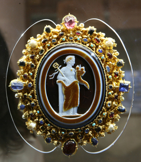 Eine Besucherin betrachtet den Onyx von Schaffhausen in der Ausstellung Heiliges Römisches Reich Deutscher Nation